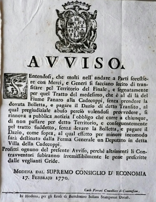 AVVISO "Sentendosi, che molti nell'andare a Parti forestiere con Merci, e Generi si facciano lecito di transitare pel Territorio del Finale, e segnatamente per quel Tratto del medesimo, che è al di là del Fiume Panaro alla Cadecoppi, senza prendere la dovuta Bolletta, e pagare il Dazio di detto Transito, [...]" Per gli Eredi di Bartolomeo Soliani, Modena 1770